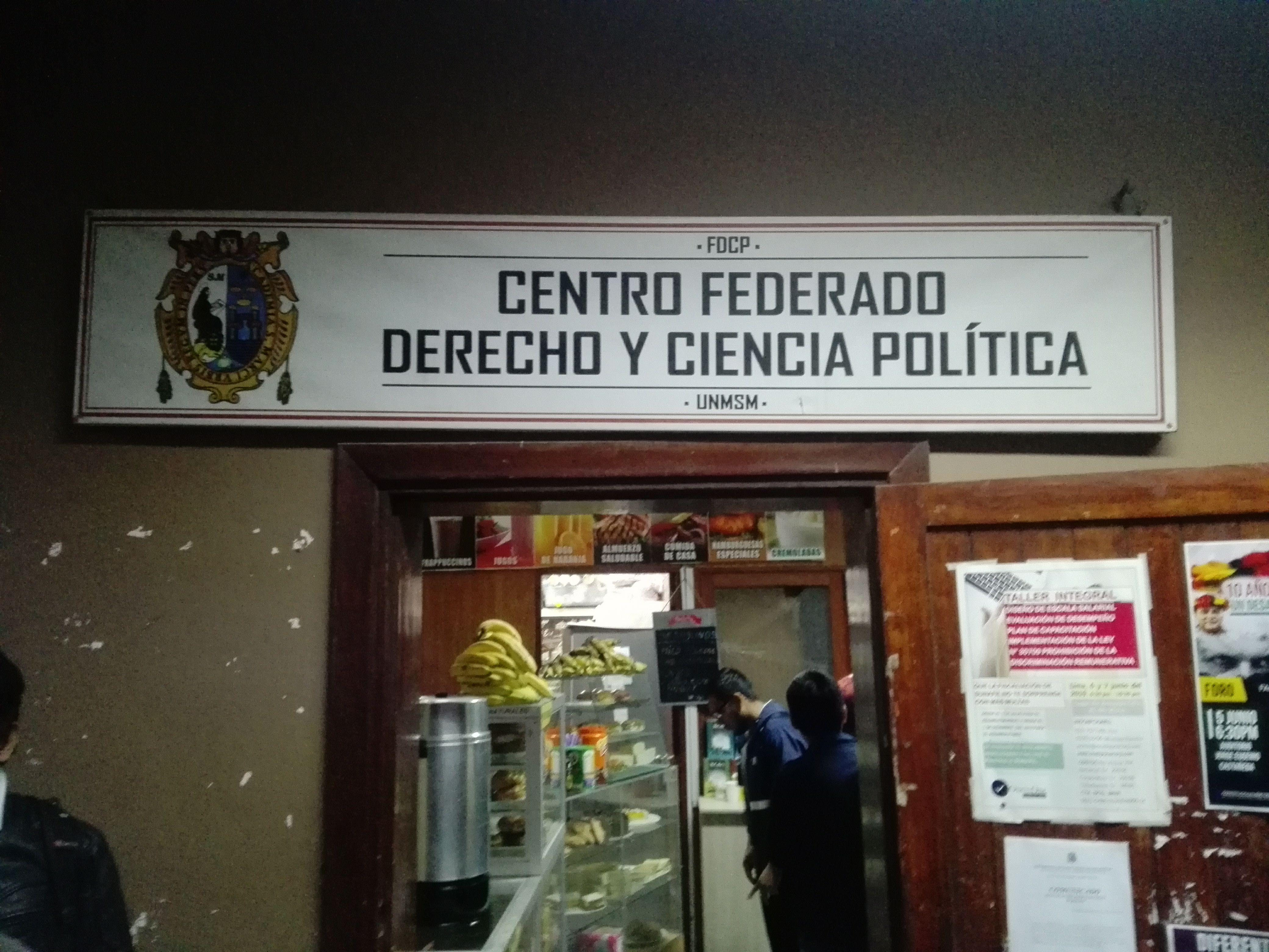 El Centro Federado de Derecho y Ciencia Política se encuentra en el segundo piso de la facultad.